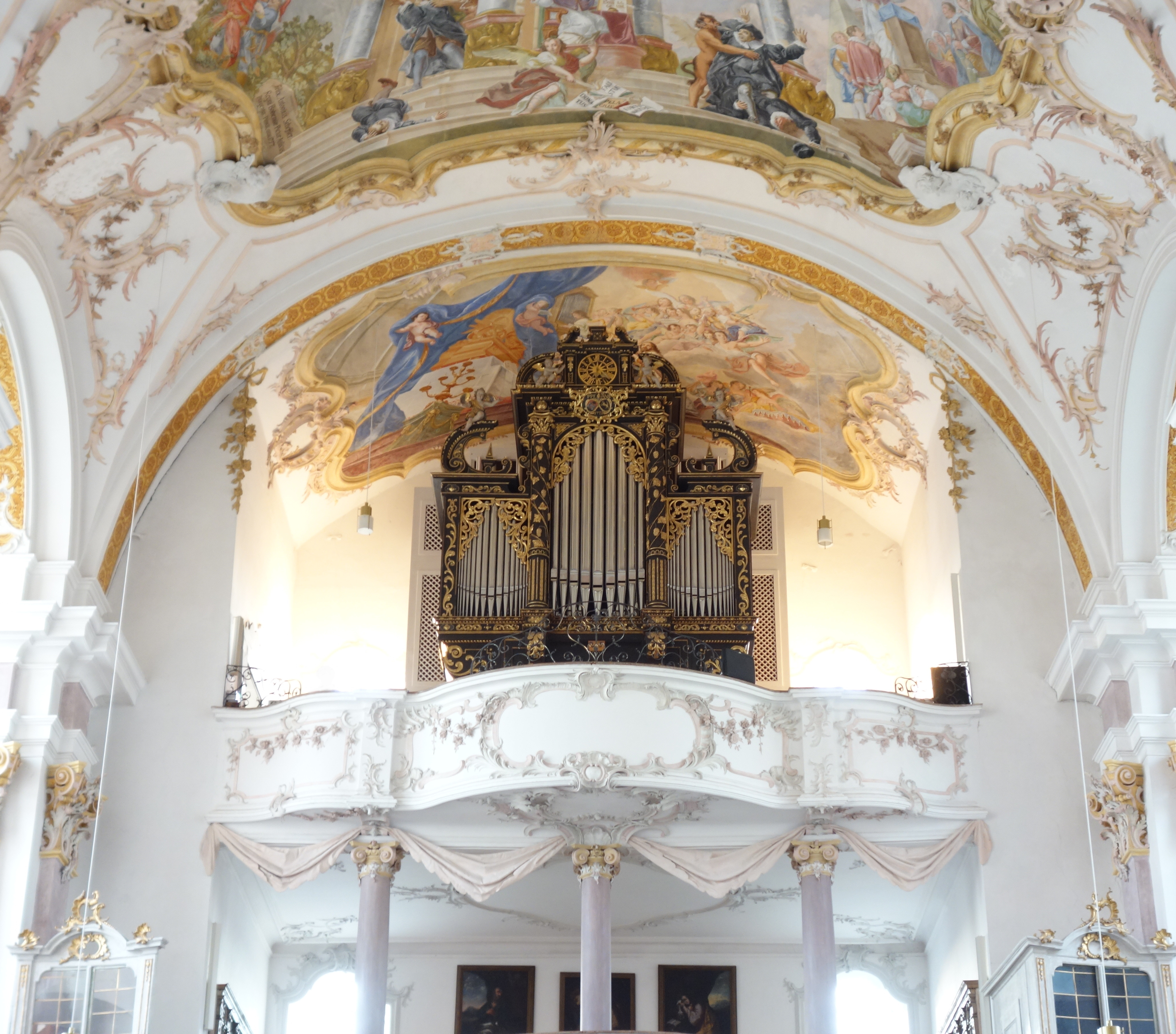 Orgel vom Kloster Baumburg in Altenmark an der Alz (1997, Rieger Orgelbau, III/34)